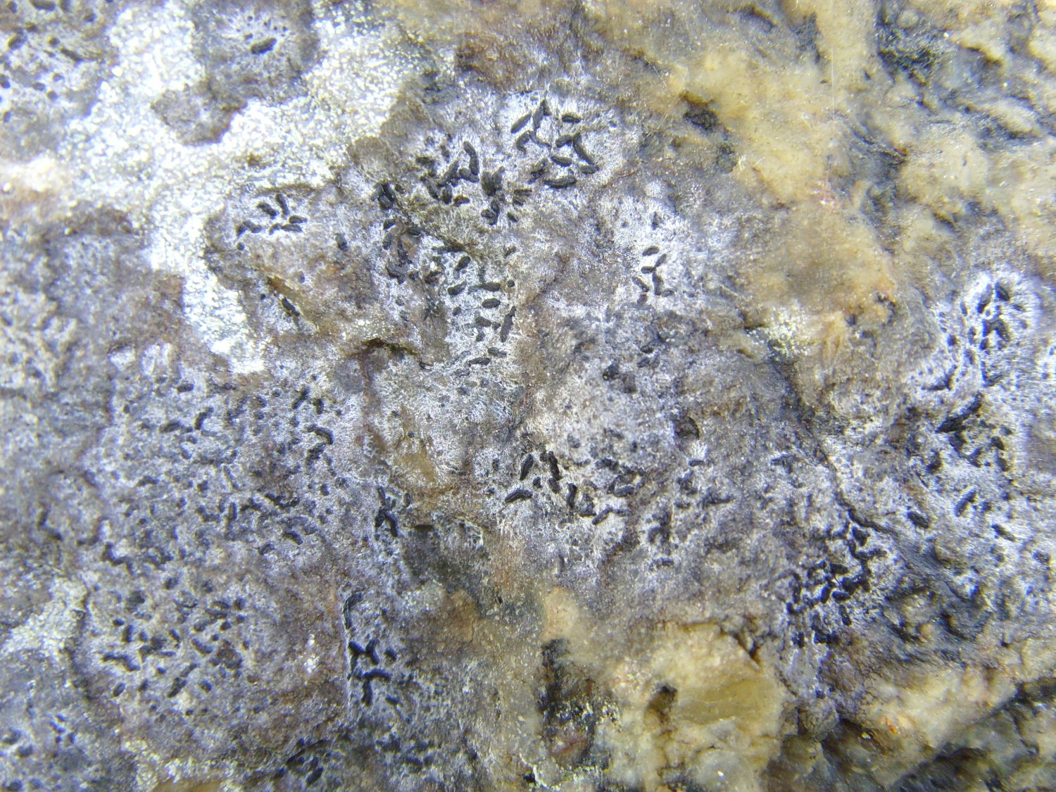 Opegrapha cesareensis (pointe du Van, Cléden-Cap-Sizun, Finistère, Bretagne, France)